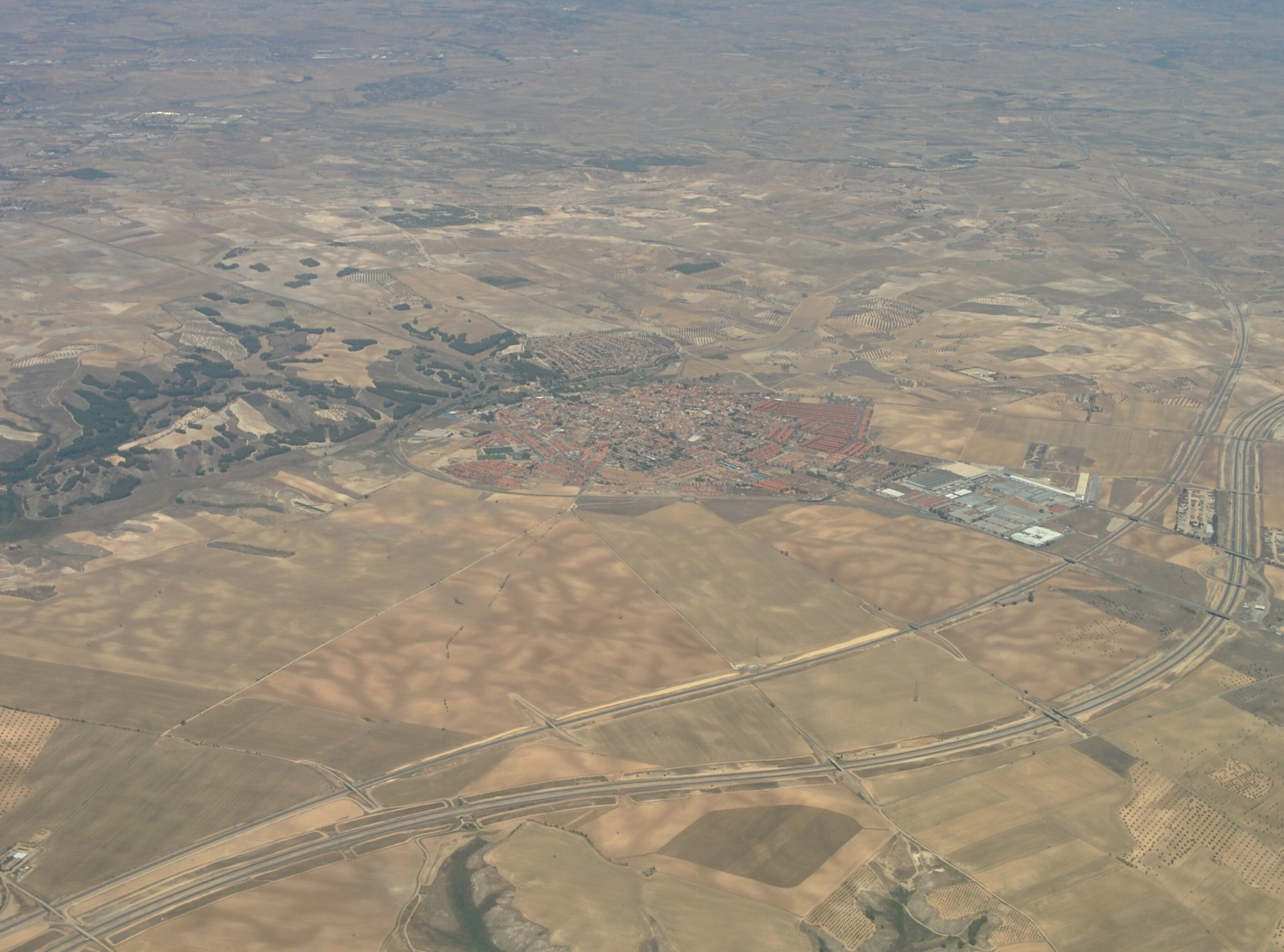 Vista aérea de Seseña, en Toledo (España).